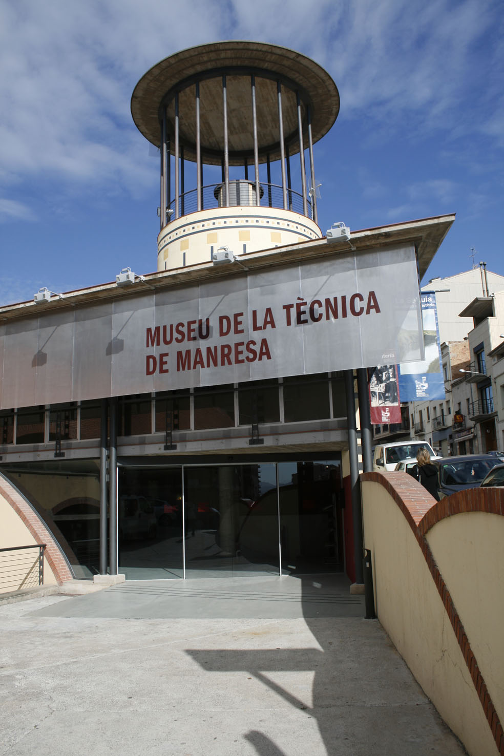 Imatge exterior del Museu de la Tècnica de Manresa